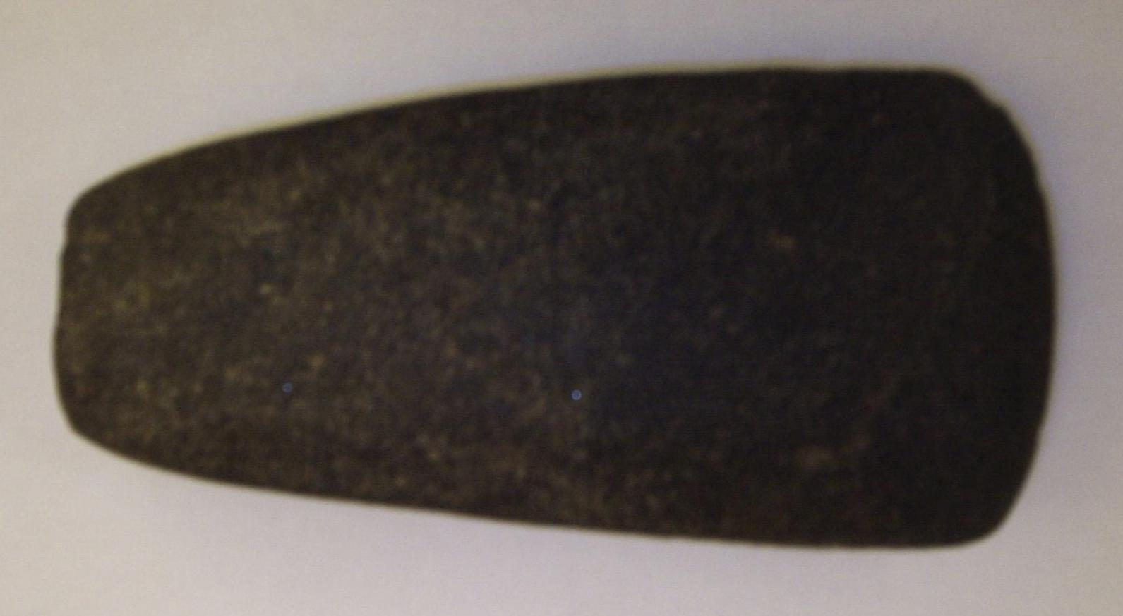 Fyrsidig mellanneolitisk yxa från okänd fyndort i Danmark, fotograferad den 18 oktober 2005 av Harri Blomberg.